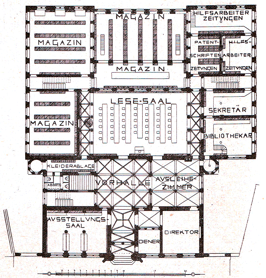 Erdgeschoss-Grundriss des Archivgebäudes des Städtischen Archivs Köln von 1897 am Gereonskloster, Architekt: Friedrich Carl Heimann